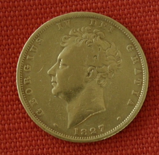 Souvreign Georg IV aus 1827